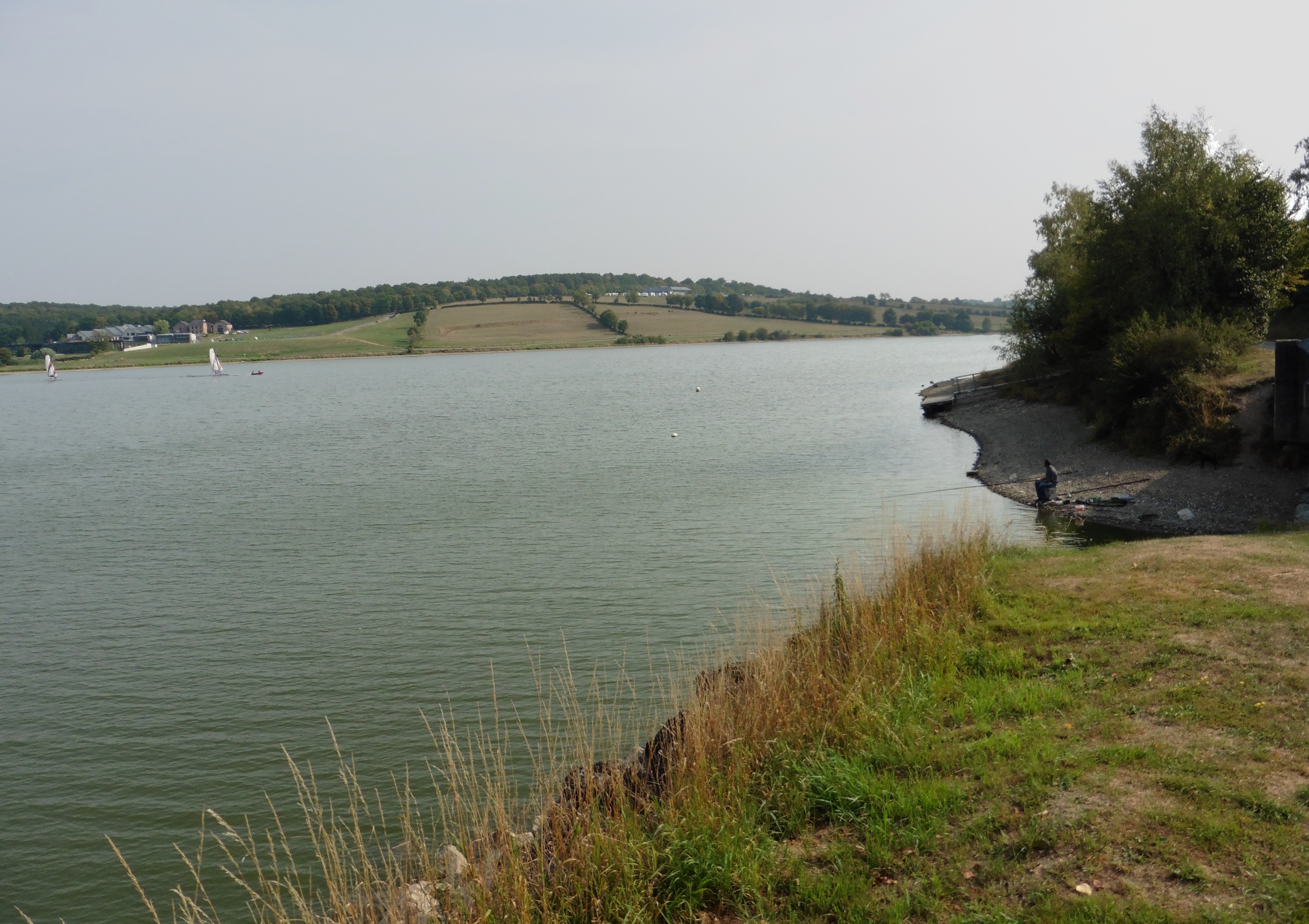 Parc naturel régional de l'Avesnois, la station touristique du Val Joly Eppe-Sauvage Nord.- France.